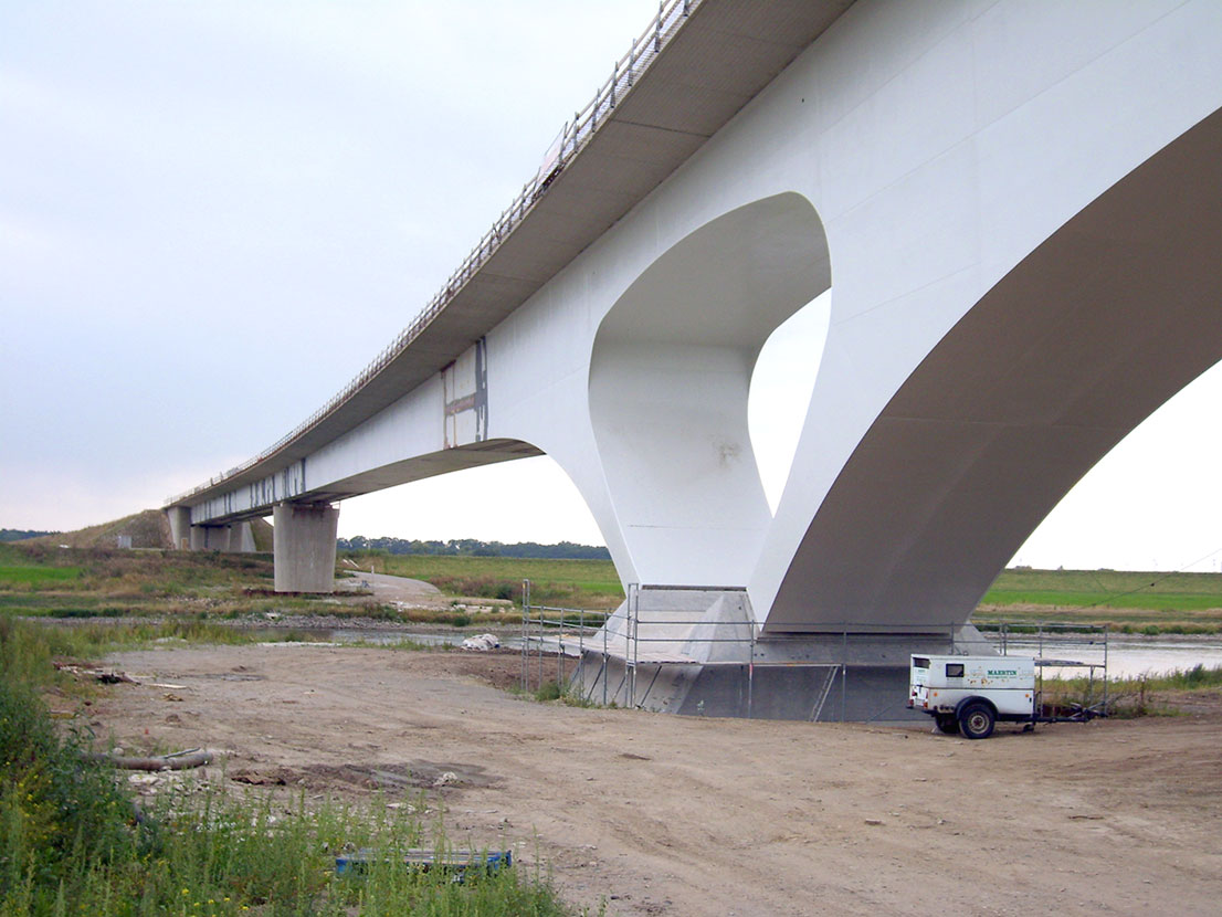 Elbebrücke bei Mühlberg im Bau (Ende August 2008 / kurz vor Fertigstellung)